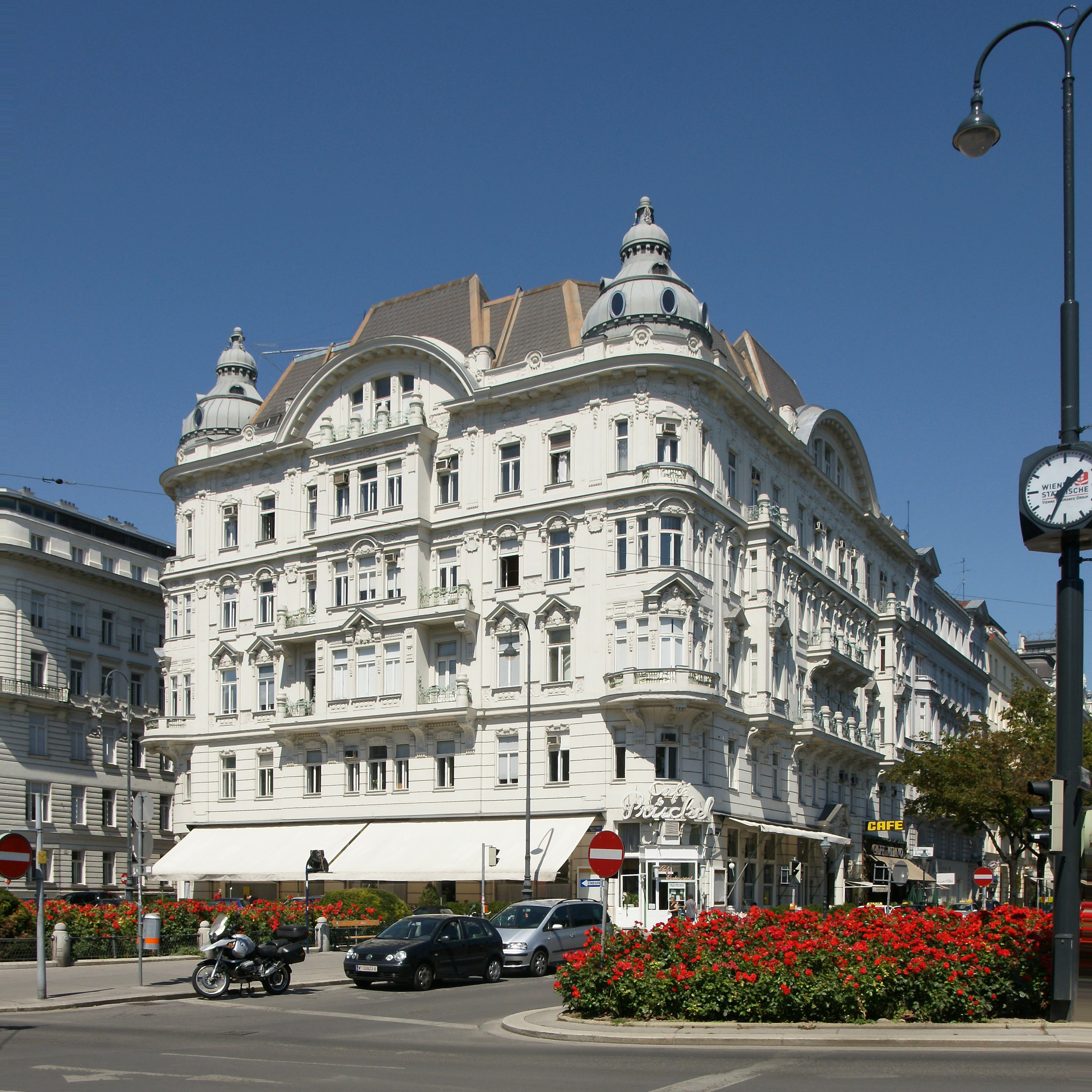 Das Café Prückel (vormals: Café Lurion) ist ein Ringstraßen-Kaffeehaus in Wien. Es befindet sich an der Ecke Stubenring und Dr.-Karl-Lueger-Platz im 1. Wiener Gemeindebezirk Innere Stadt gegenüber dem Museum für angewandte Kunst und dem Stadtpark. Besondere Bekanntheit genießt das Kaffeehaus wegen seiner Einrichtung im Stil der 1950er Jahre.